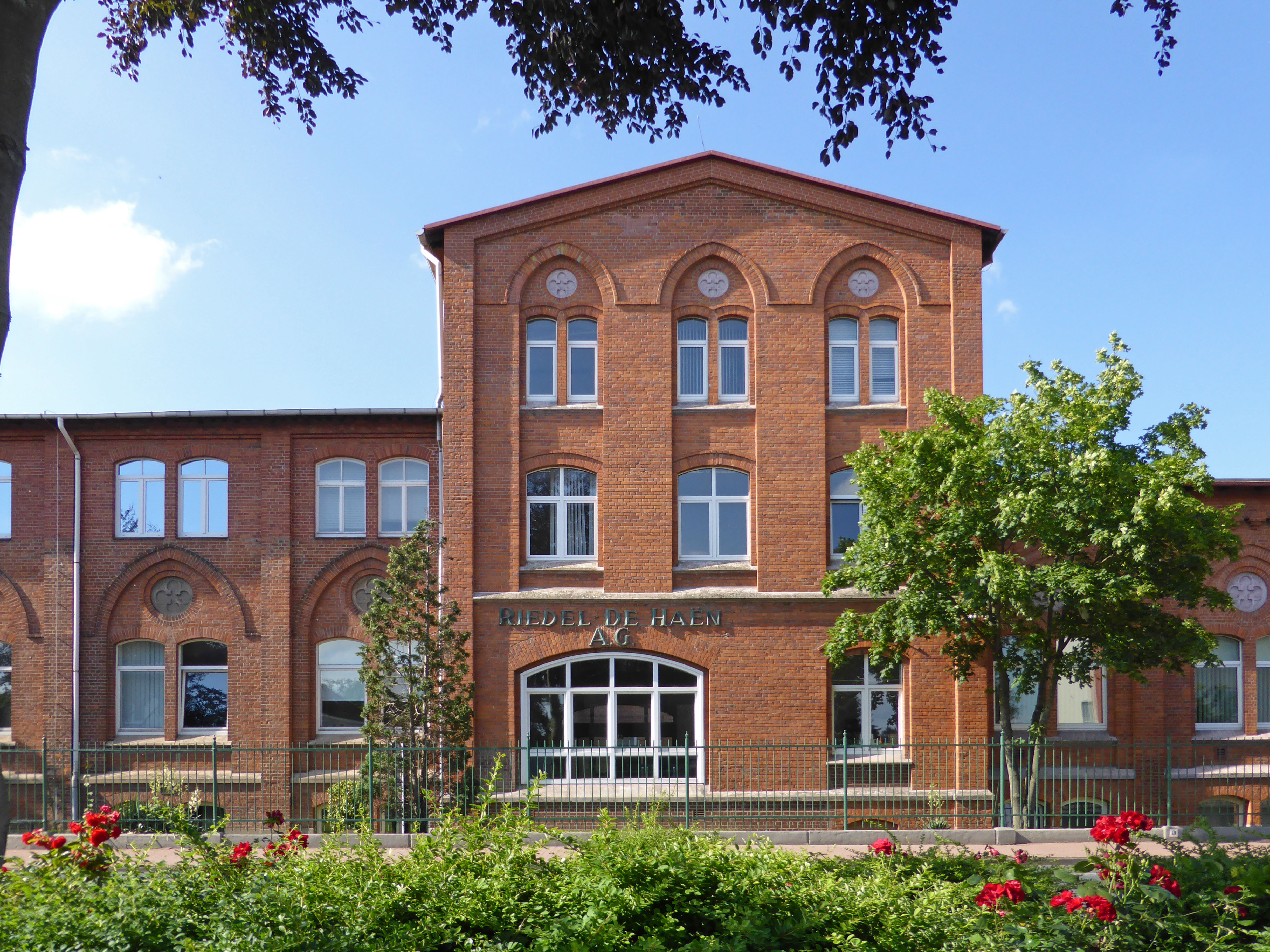 Firmengebäude der ehemaligen Riedel de Haen Ag Seelze